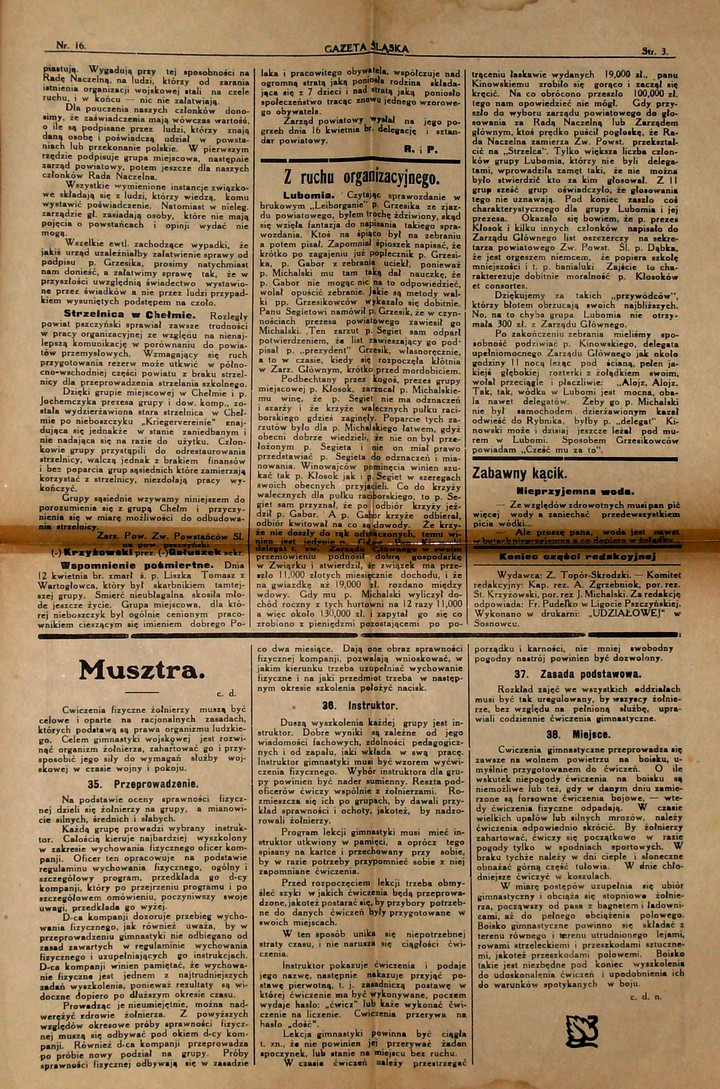 Gazeta Śląska z 1925, nr 16, s. 3